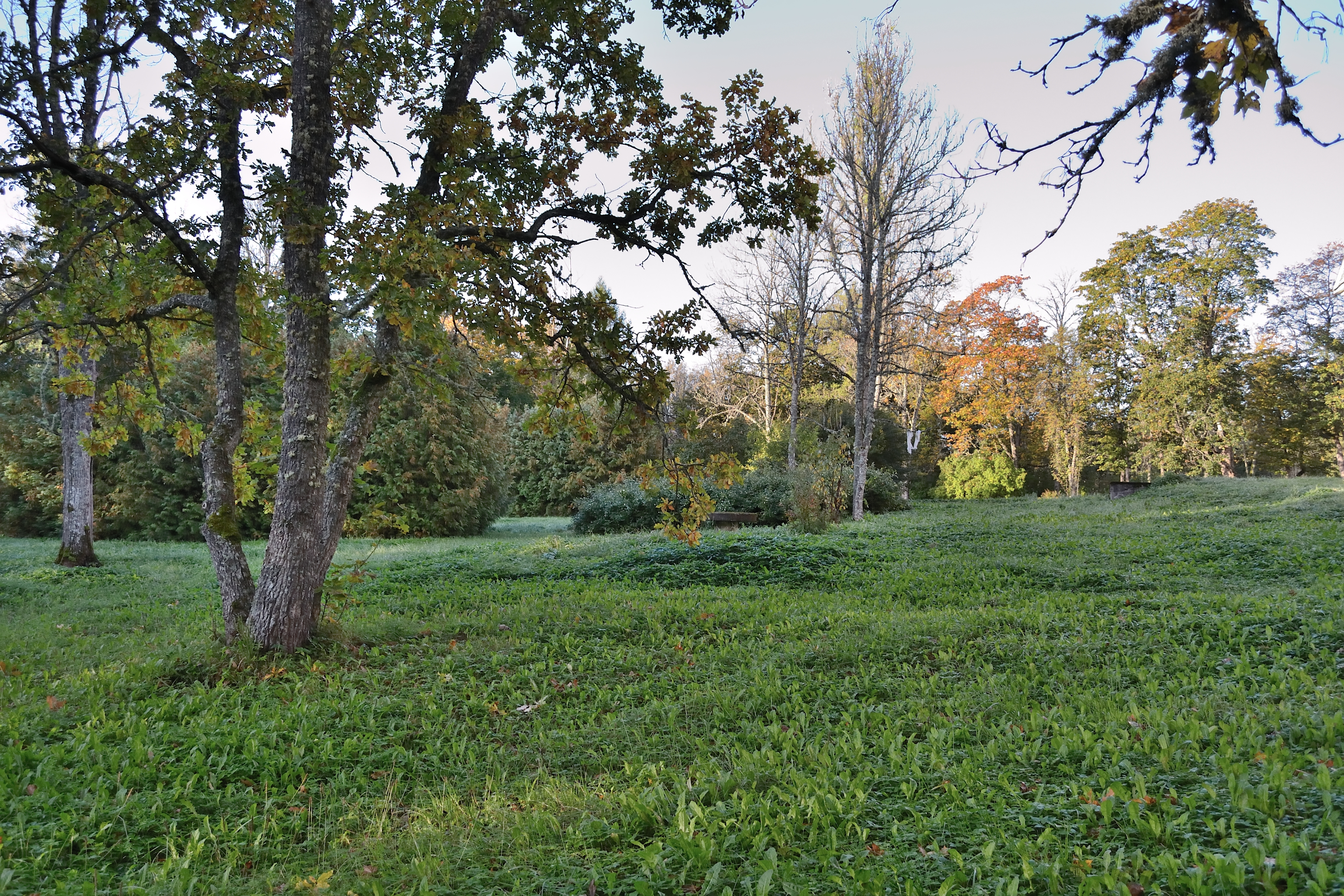 Riisipere mõisa park, 18.-20.saj